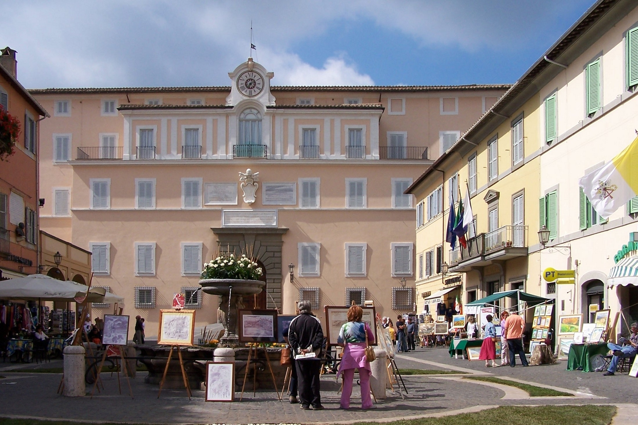 Castel Gandolfo, Sommerresidenz des Papstes